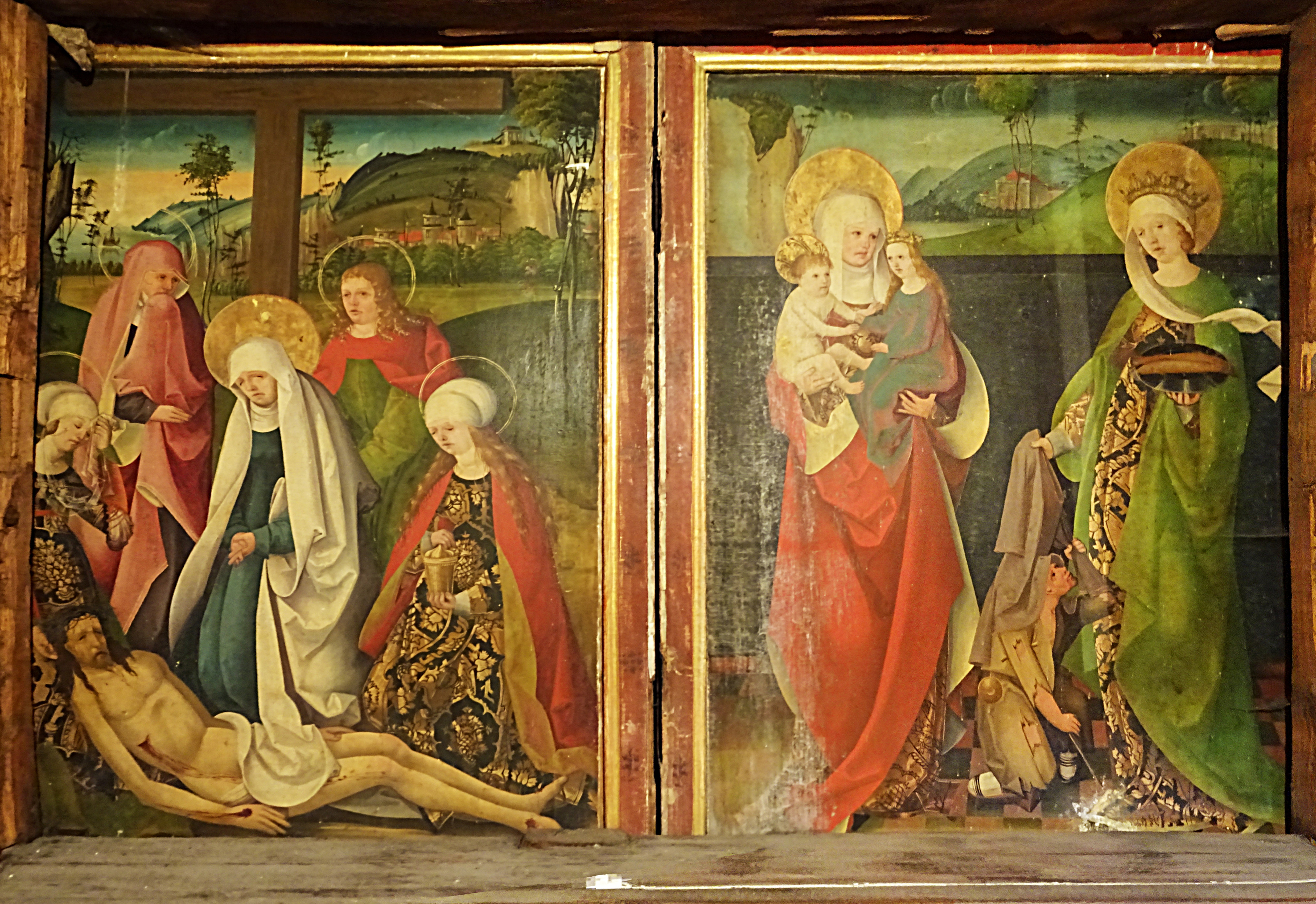 Vierflügeliger Schnitzaltar von 1504 aus Saalfelder Schule in der Dorfkirche Ammerbach. Die geschlossenen Seitenflügel zeigen Anfang und Ende Jesu. Links die Rückseite des rechten Seitenflügels, die Beweinung Jesu. Rechts die Rückseite des linken Seitenflügels, Anna Selbdritt und Elisabeth.